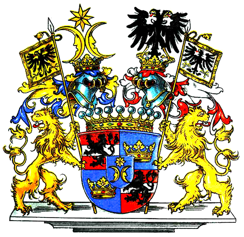 Wappen der Grafen Finck von Finckenstein